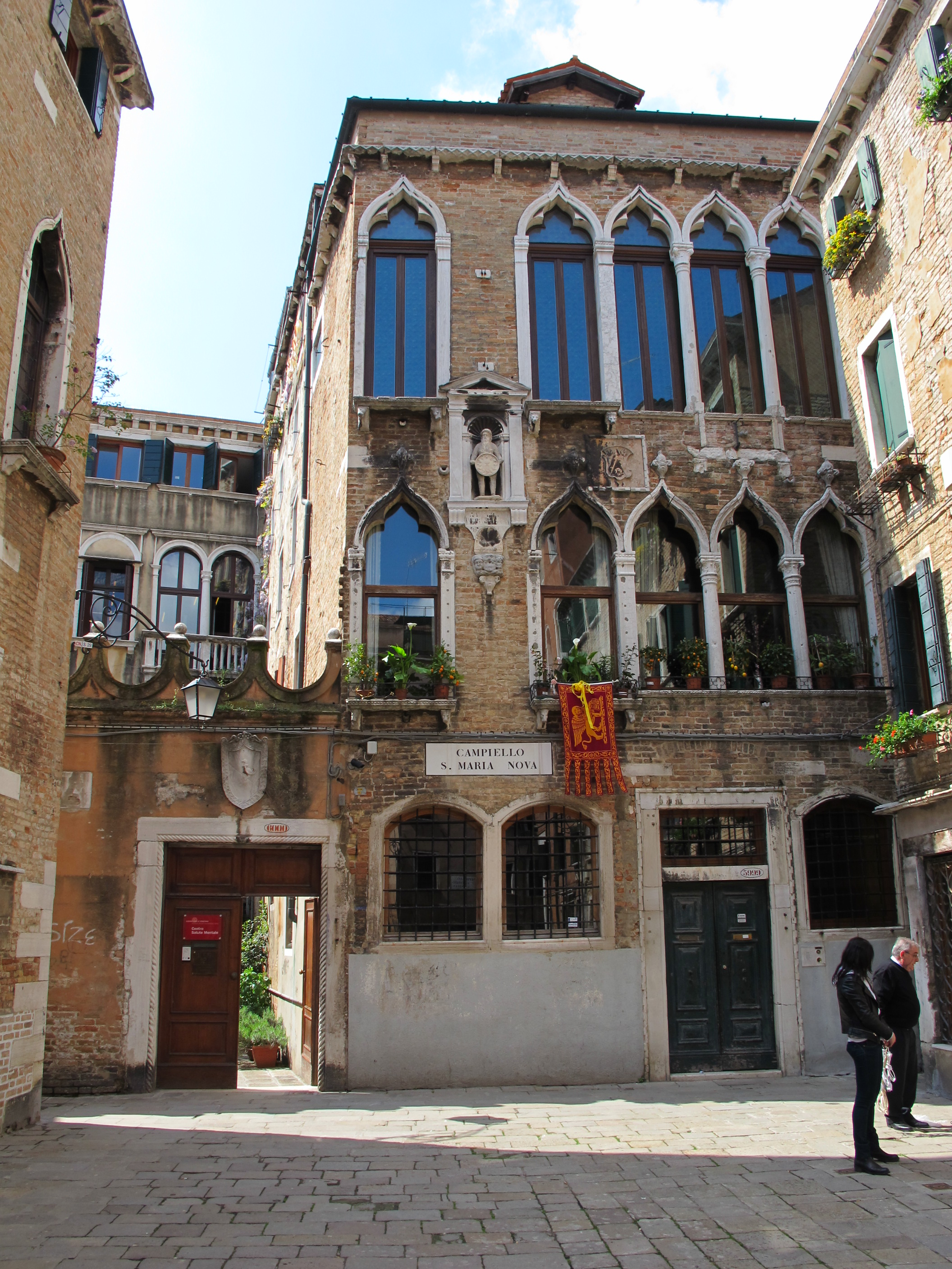 Venezia, campiello santa maria nova